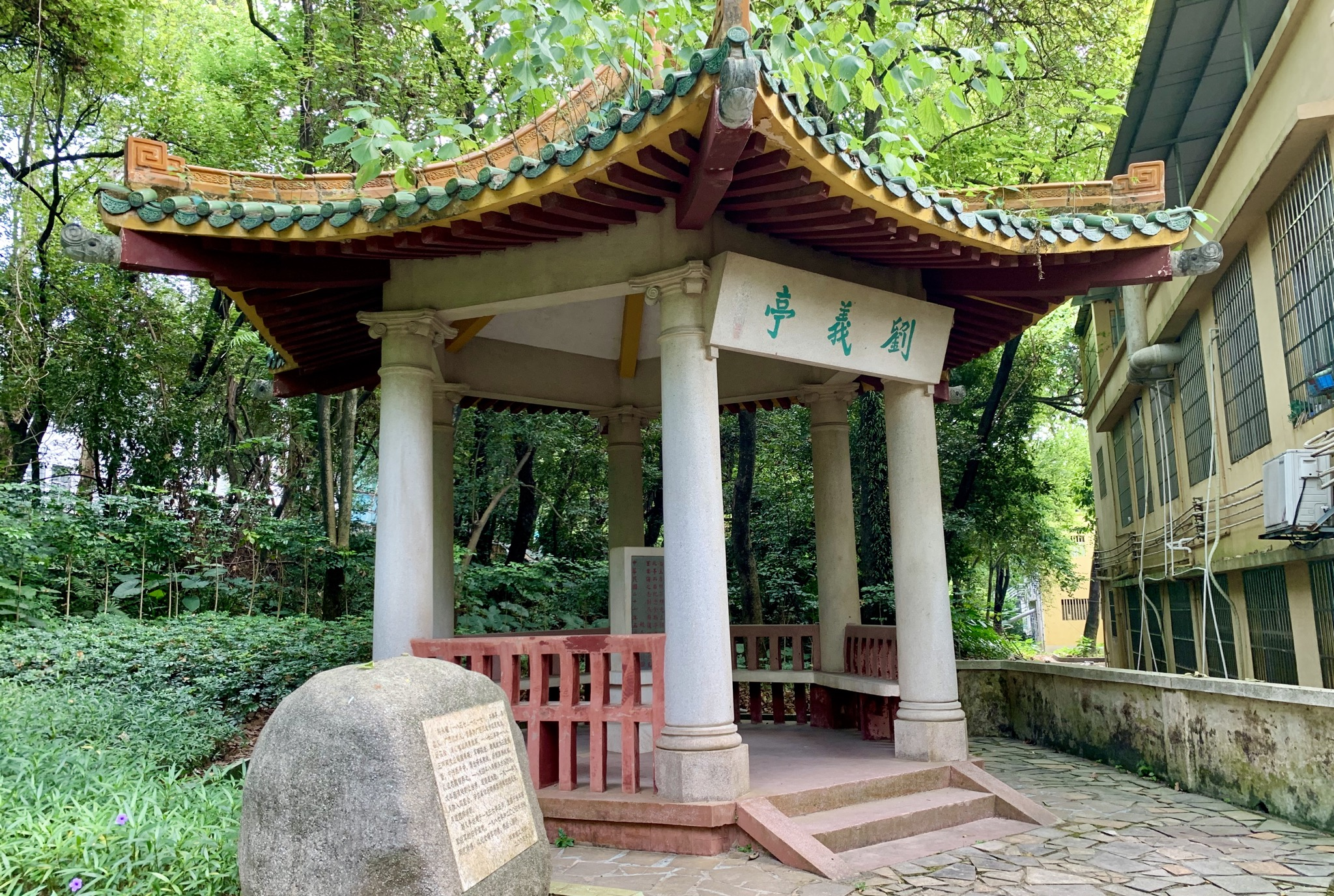 位于华南理工大学五山校区（北校区）北区内的刘义亭，为纪念晚清将领刘永福所建